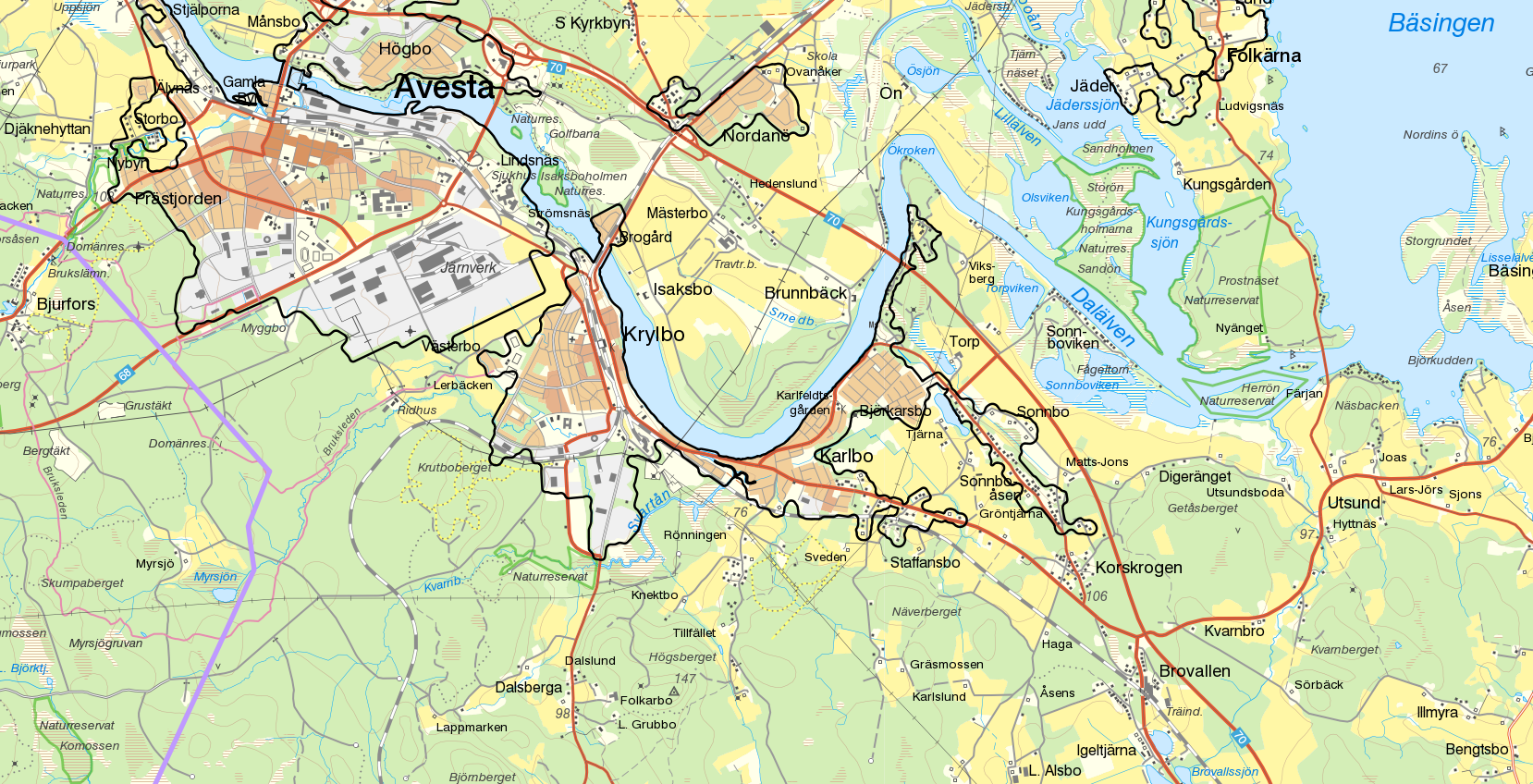 Tätorten Krylbo med gränserna från Statistiska centralbyråns tätortsavgränsning 2015 i svart. Bakgrundskarta från Lantmäteriet, skala 1:30 236.